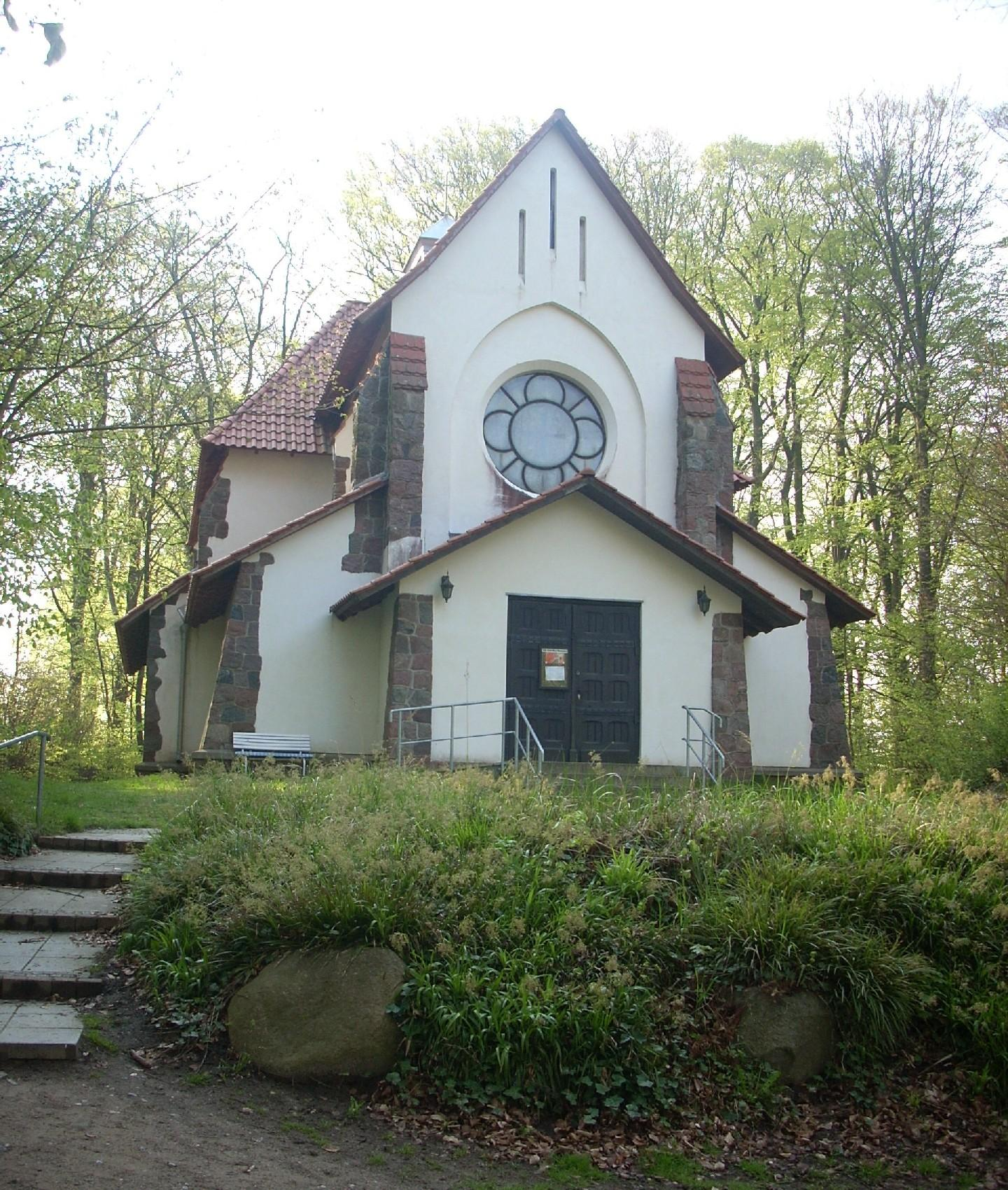 Kath. Kirche Maria Meeresstern, Sellin auf Rügen, Deutschland